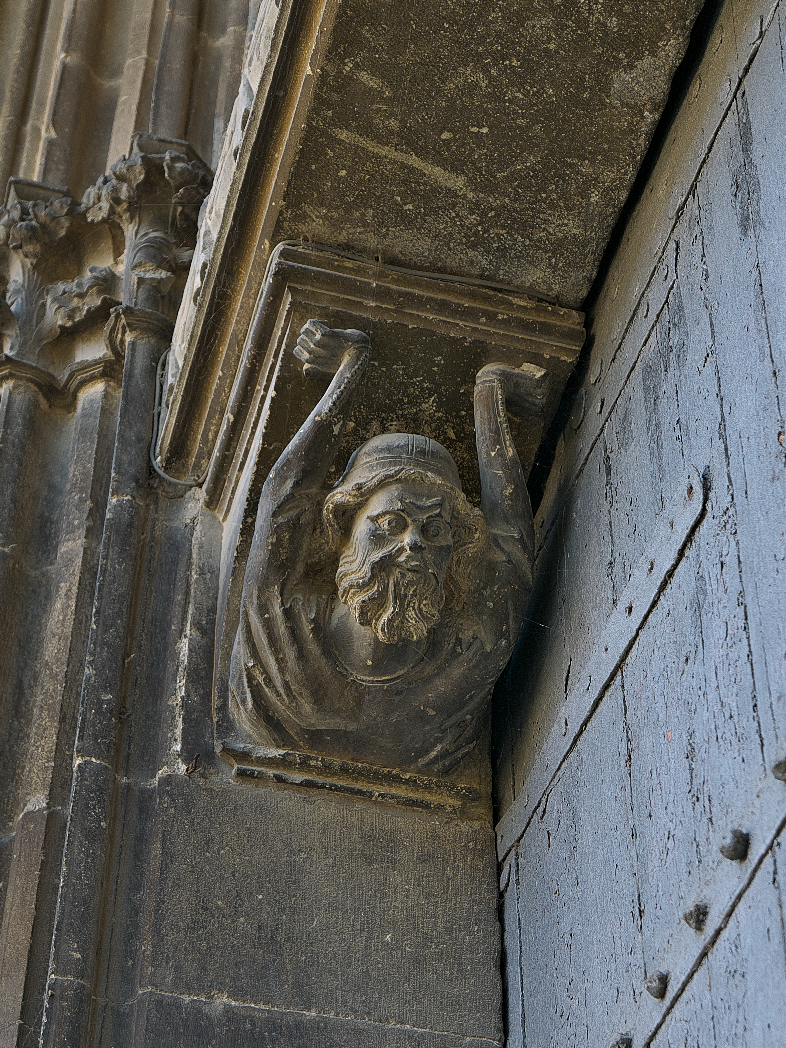 Mocheta de la portada de la Iglesia del Santo Sepulcro (Estella).